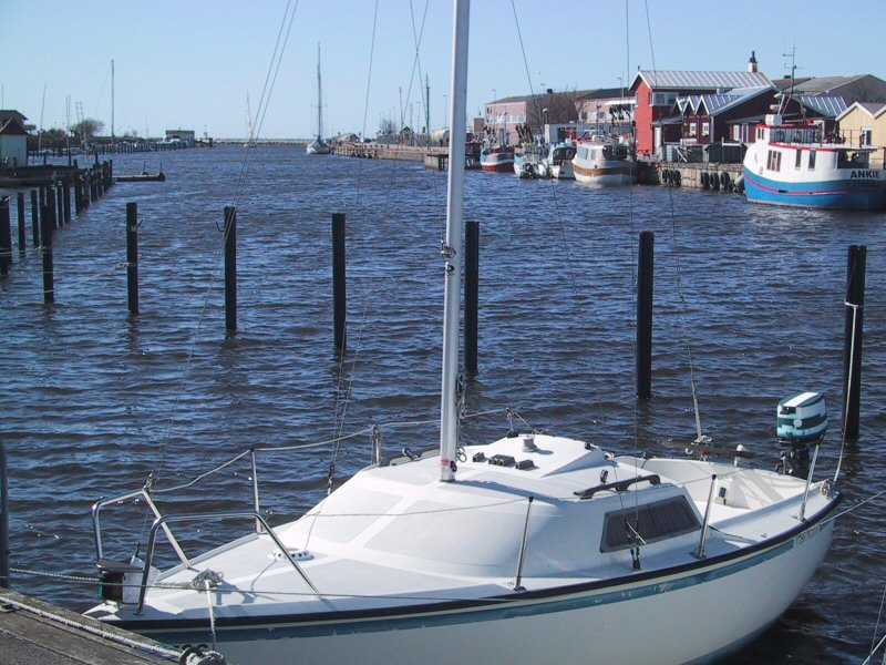 Lomma harbour